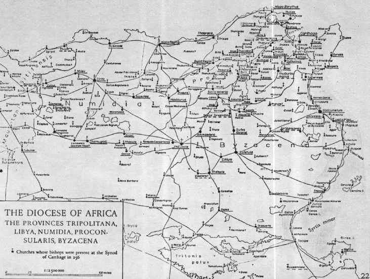 Carte des évêchés africains au temps de S. Cyprien (256)